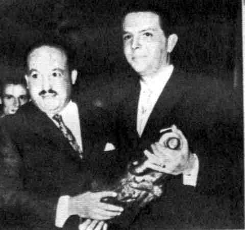 Fotografía de Adolfo Salinas recibiendo el Premio Martín Fierro como mejor locutor, en la primera ceremonia de los premios, en 1959.